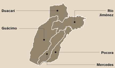 Mapa de los distritos del cantón de Guácimo, provincia de Limón, Costa Rica.